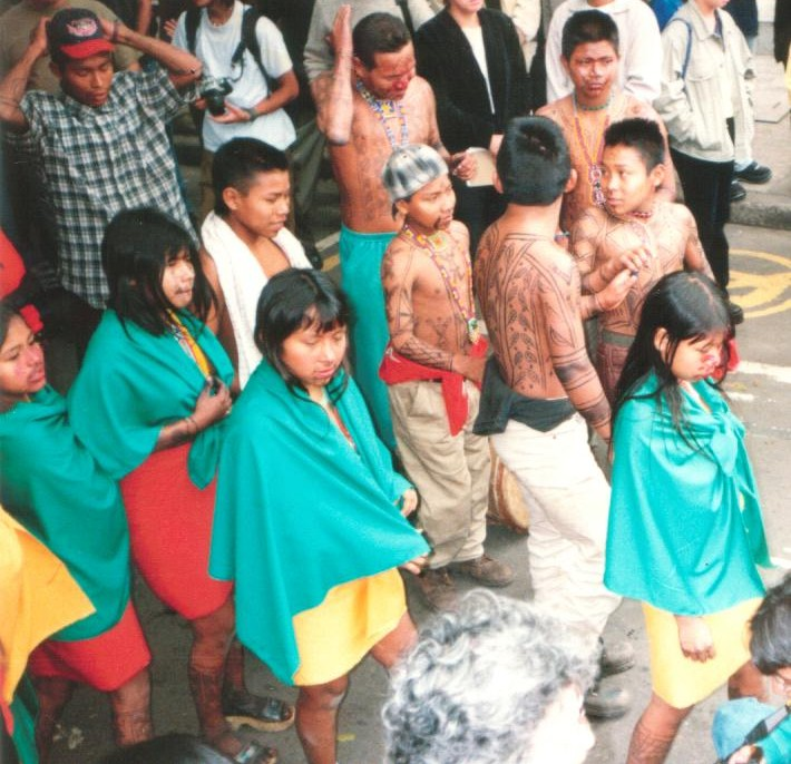 Niños Embera durante la ocupación del Ministerio del Ambiente en Bogotá, como protesta por la construcción de la represa de Urrá.